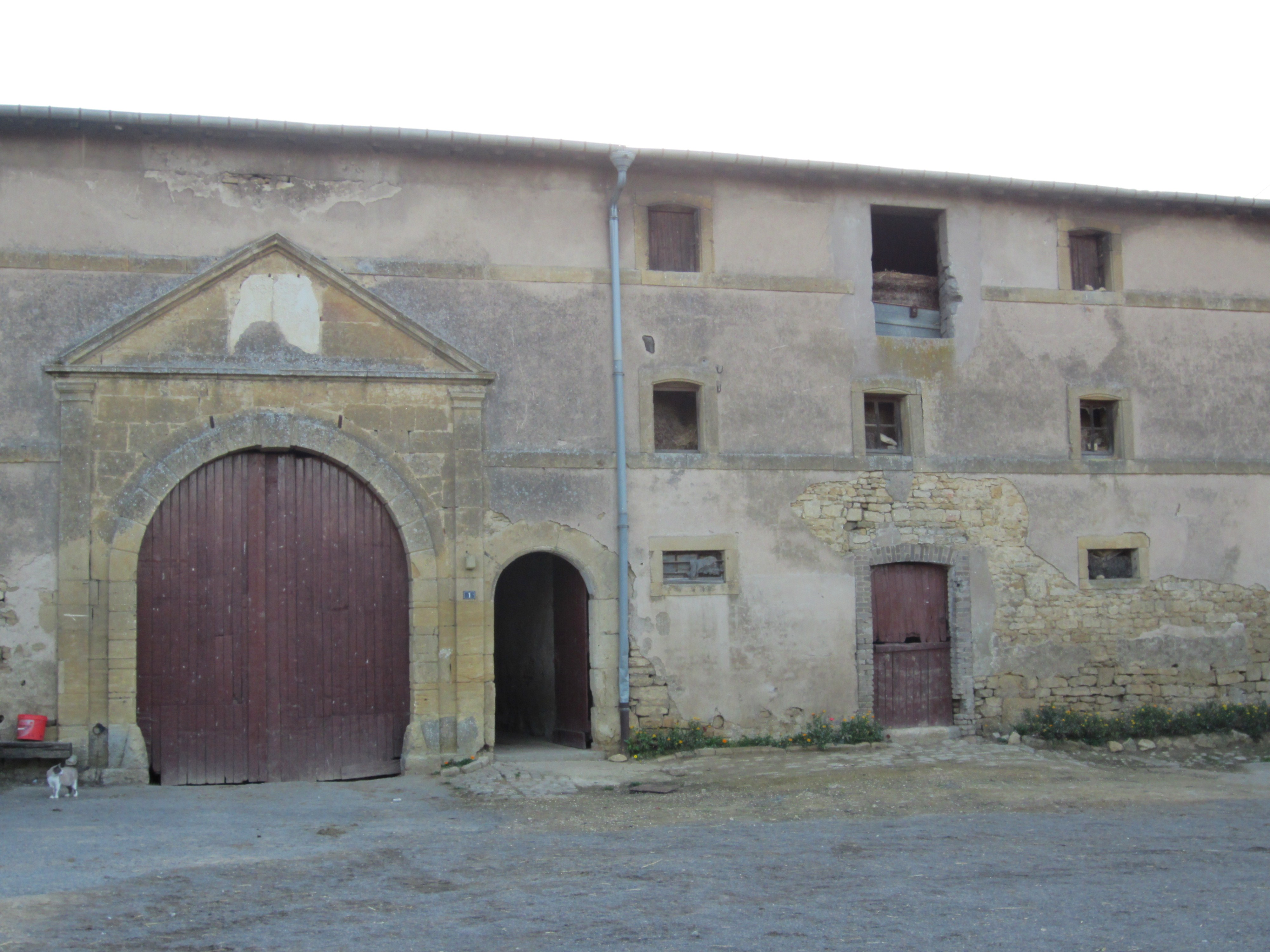 Description chateau Affleville chateau Affleville